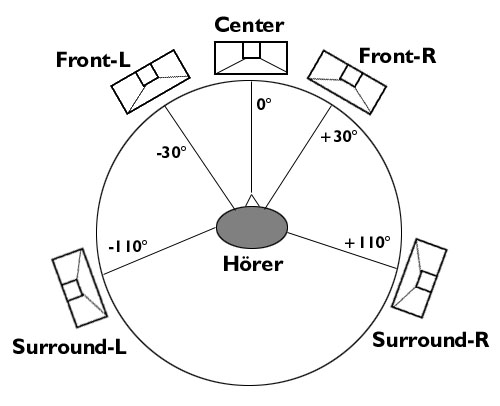 ITU-Kreis für 5.1 Surround Sound Grafik: Malte Ruhnke, kasselgalerie.de (selbst erstellt)